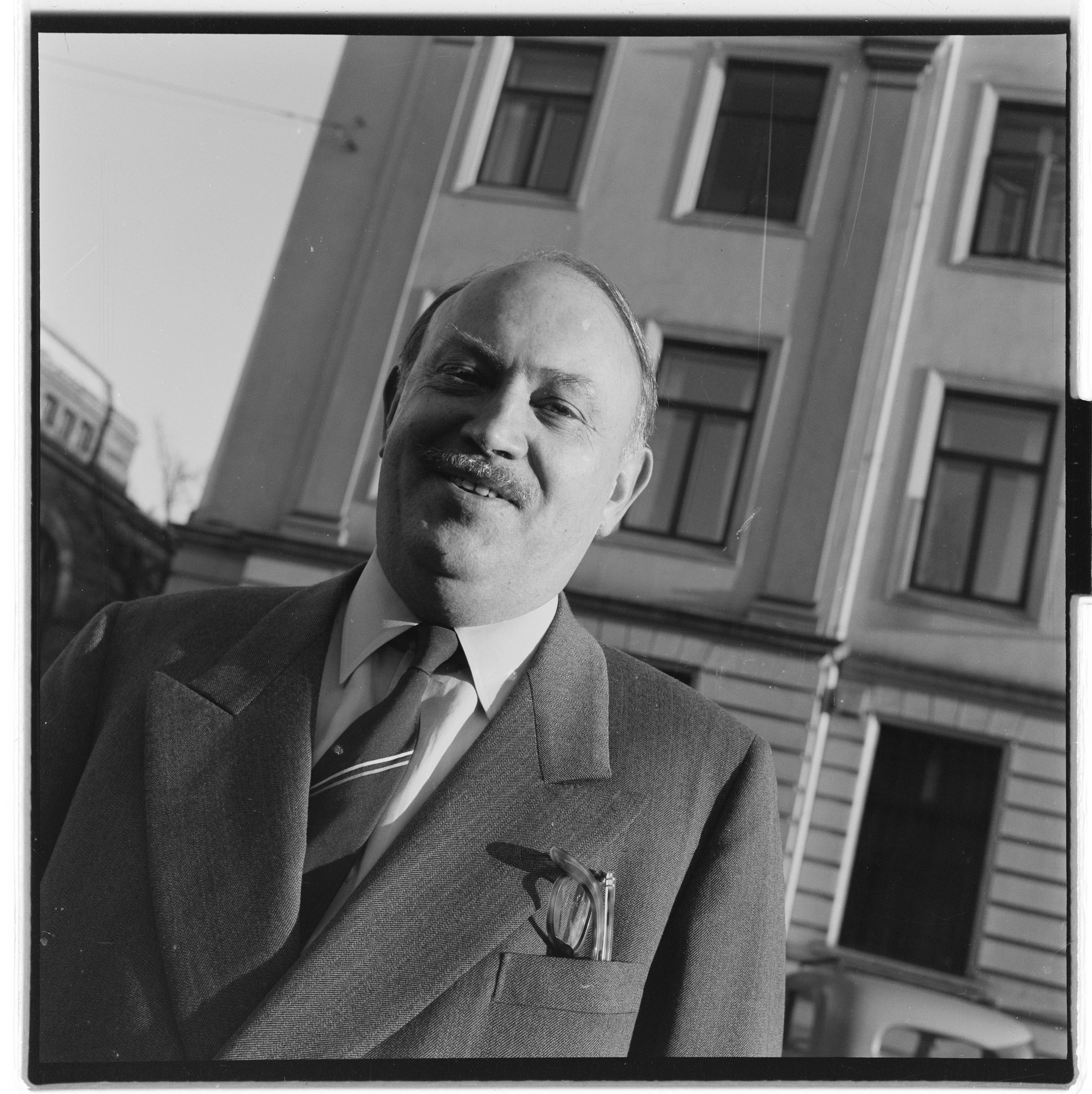 Bildet er hentet fra Arkivverket. Rolf Stenersen. NÅ nr. 25, 1953 Arkivinstitusjon : Riksarkivet Arkivnavn : Billedbladet NÅ Sted : Norge, Ukjent, Ukjent, Ukjent Emneord: Menn, Portretter, Bymiljø Avbildet: Stenersen, Rolf